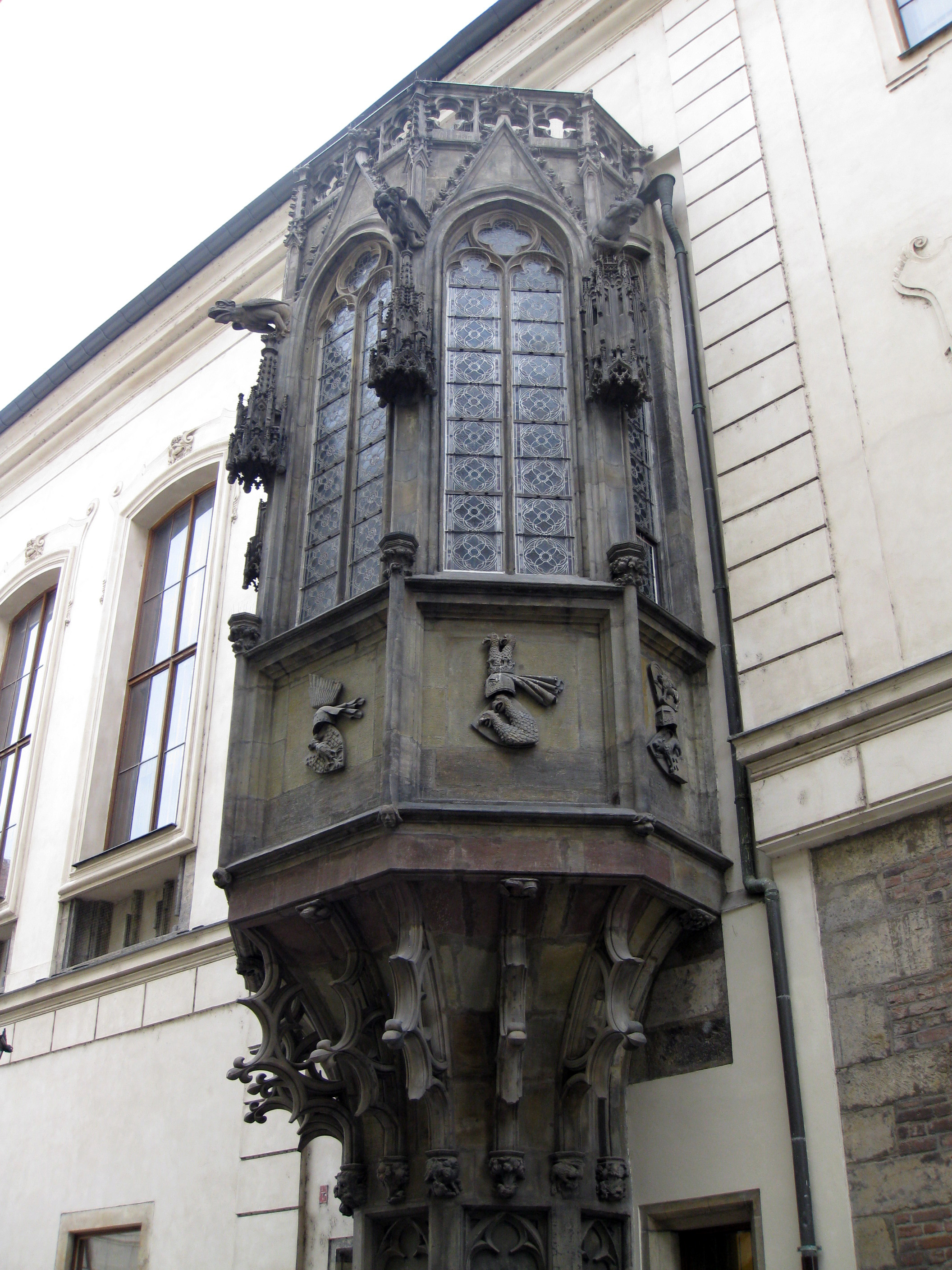 Universita Karolinum (Staré Město), Praha 1, Kamzíková, Celetná, Železná, Ovocný trh 541/9, Staré Město